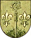 Historical coat of arms of Cerekwica (Lower Silesian voivodship, Trzebnica county)